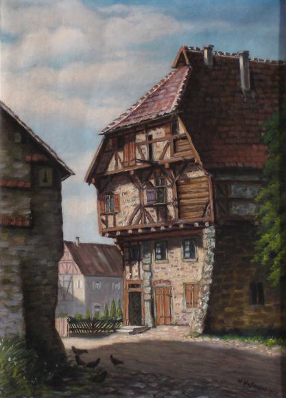 Altes Haus in Pfullendorf (Sammlung: Heimatmuseum Pfullendorf)